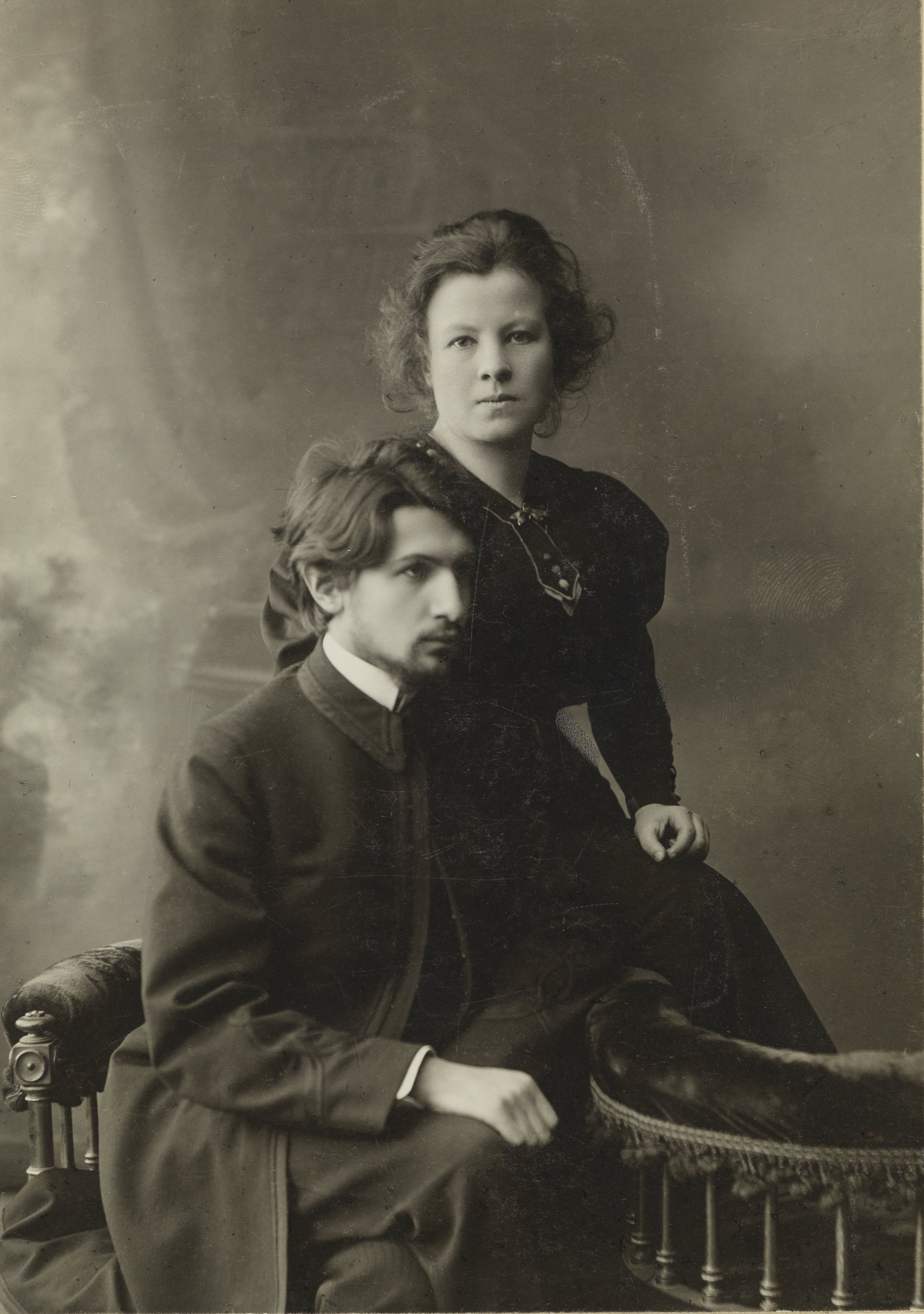 Portret Neli Samotyhowej z mężem Erazmem Samotyhą